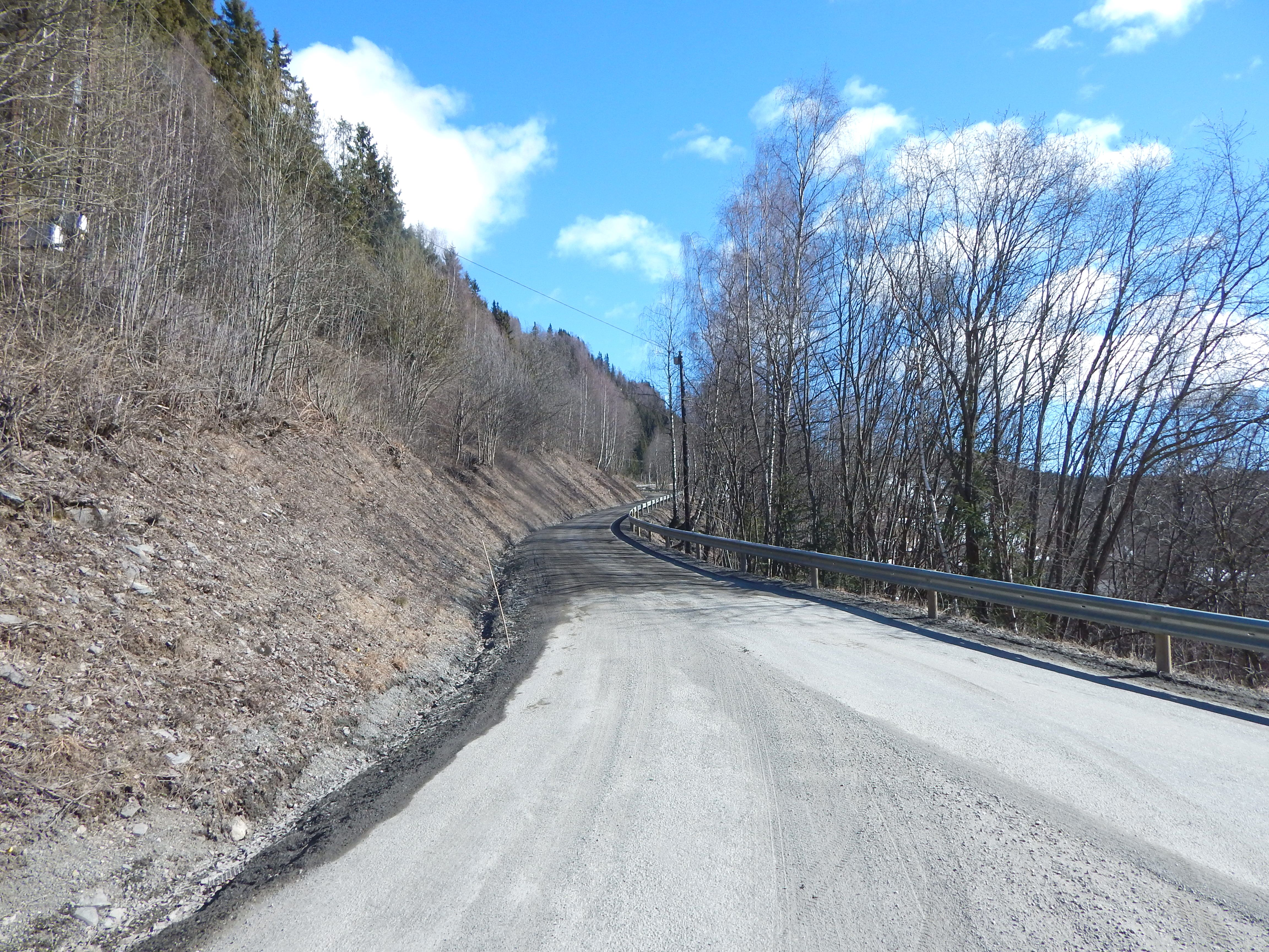 Nordbygdsvegen (fylkesvei 361) ved Kvam i Øyer